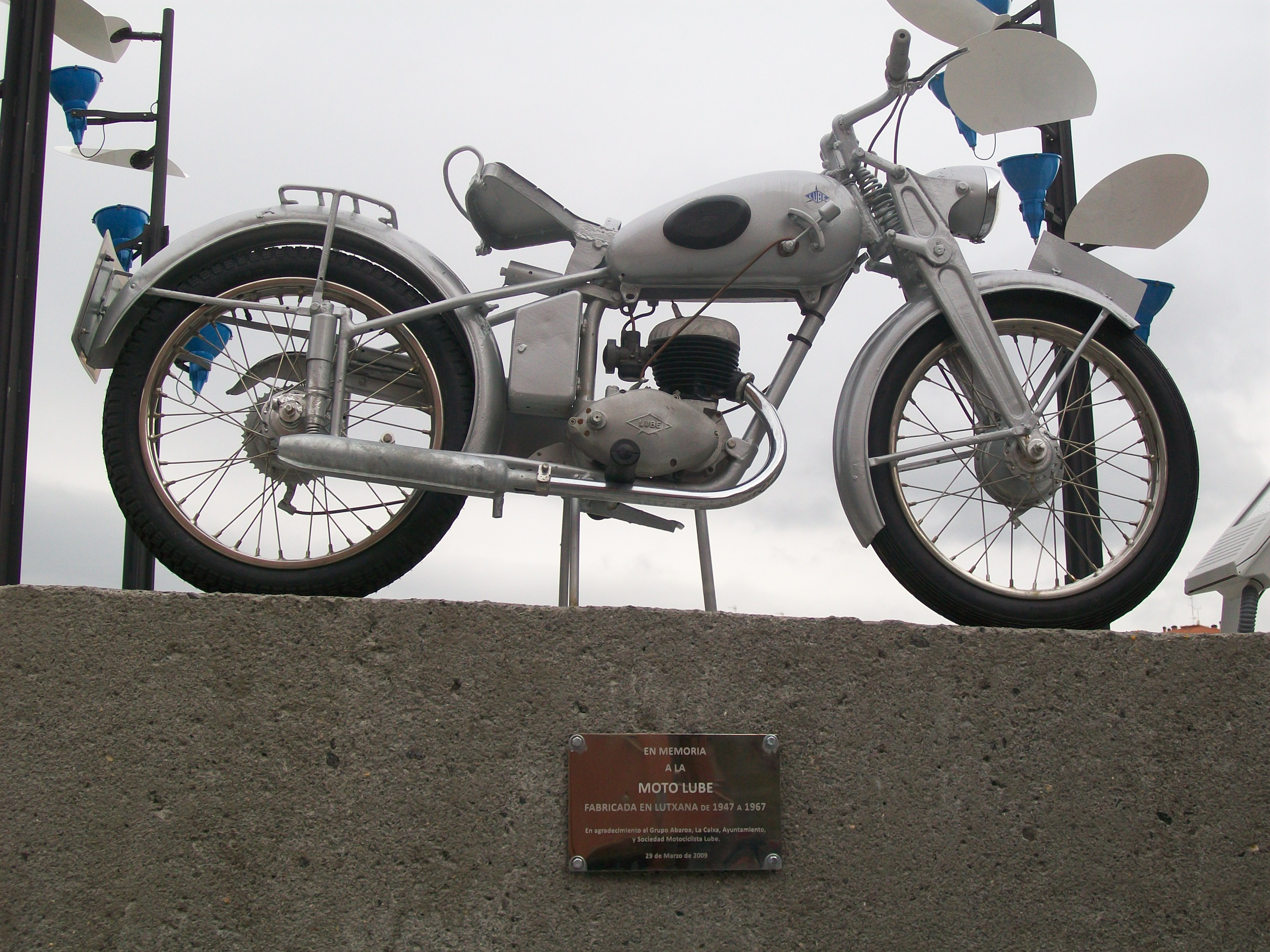 Monumento a la moto Lube, situada en el barrio baracaldés de Luchana